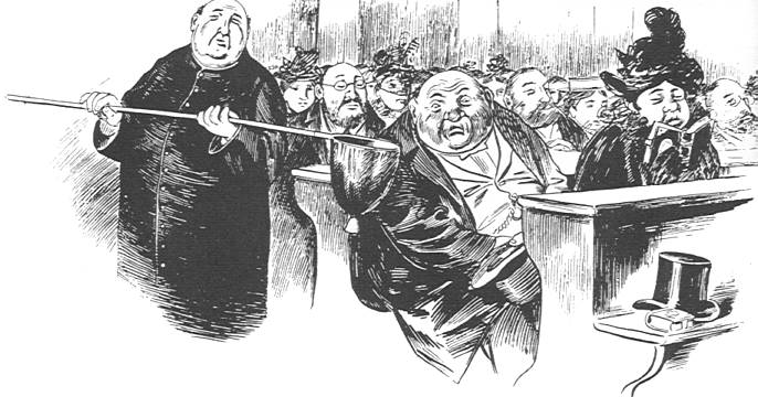 Der Zentrumsmann: "Herrschaftsaxen! Is der Knopf fest ang'näht!"